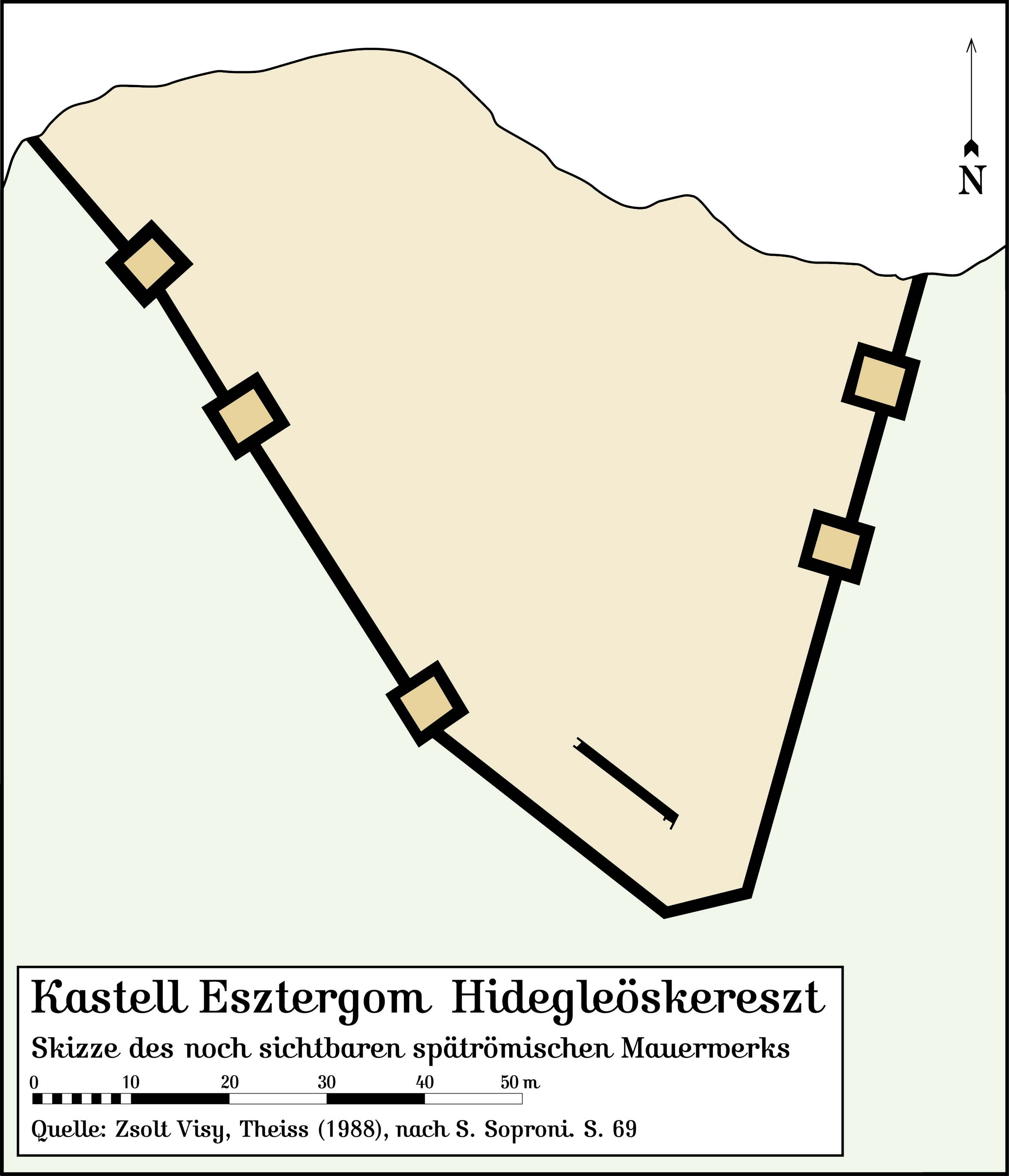 Skizze des in Ungarn gelegenen spätantiken Donaukastells Esztergom–Hideglelőskereszt. Zeichnung nach einer Vorlage von S. Soproni in Zsolt Visy (Theiss 1988). S. 69. Hergestellt am Macintosh unter Macromedia Freehand MX; abgespeichert für Wikipedia unter Adobe Photoshop CS 2.